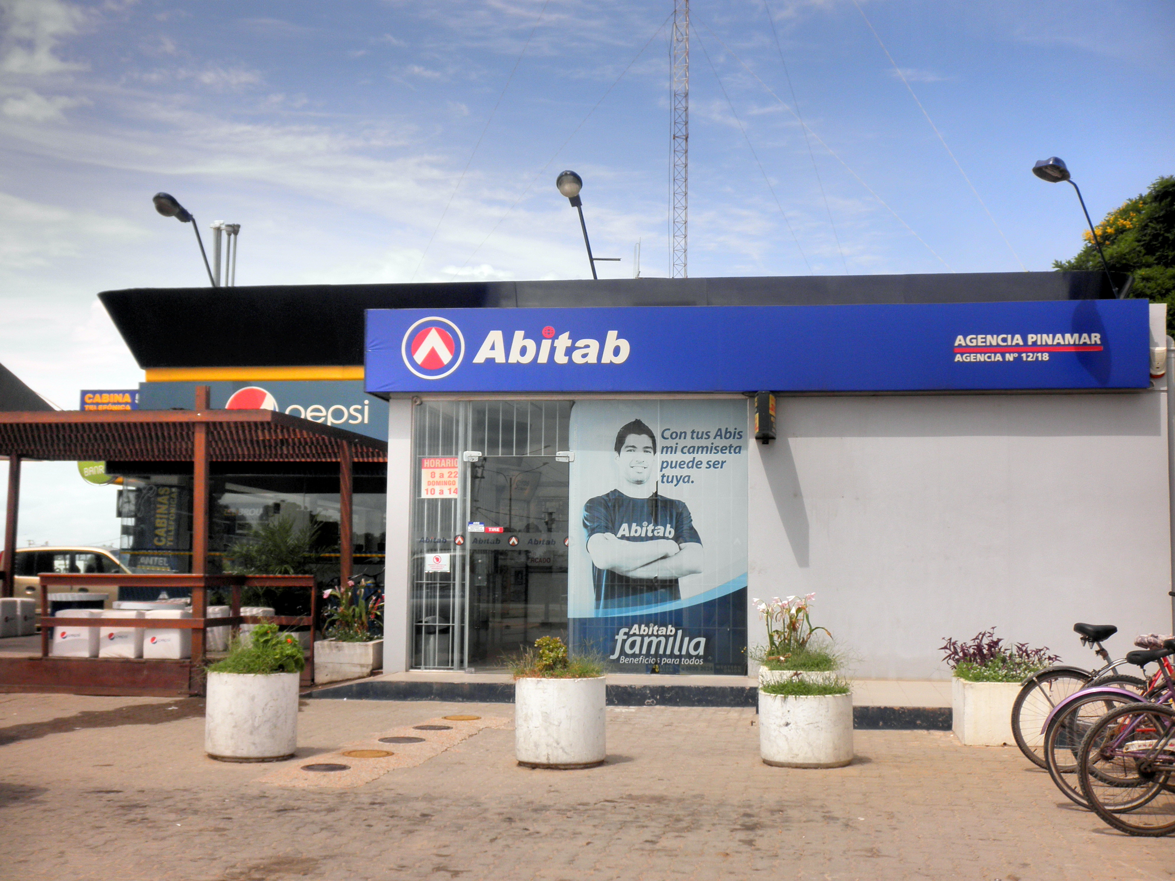 Abitab Agencia Pinamar Nº 12/18